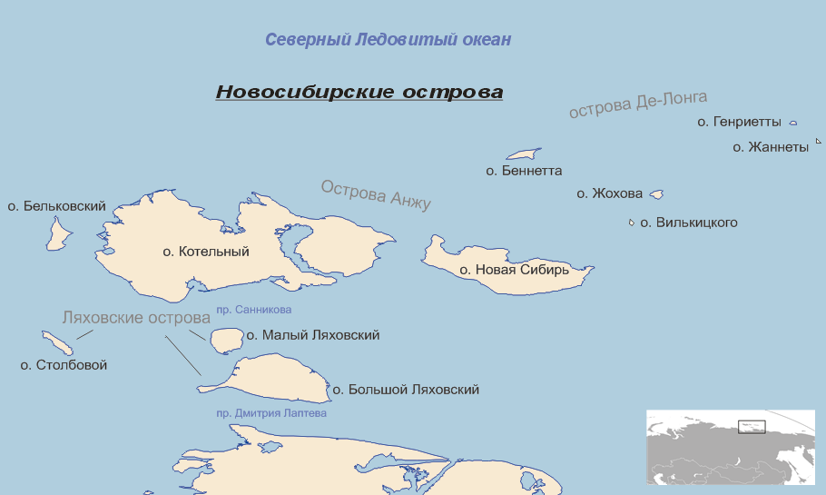 Новосибирские острова